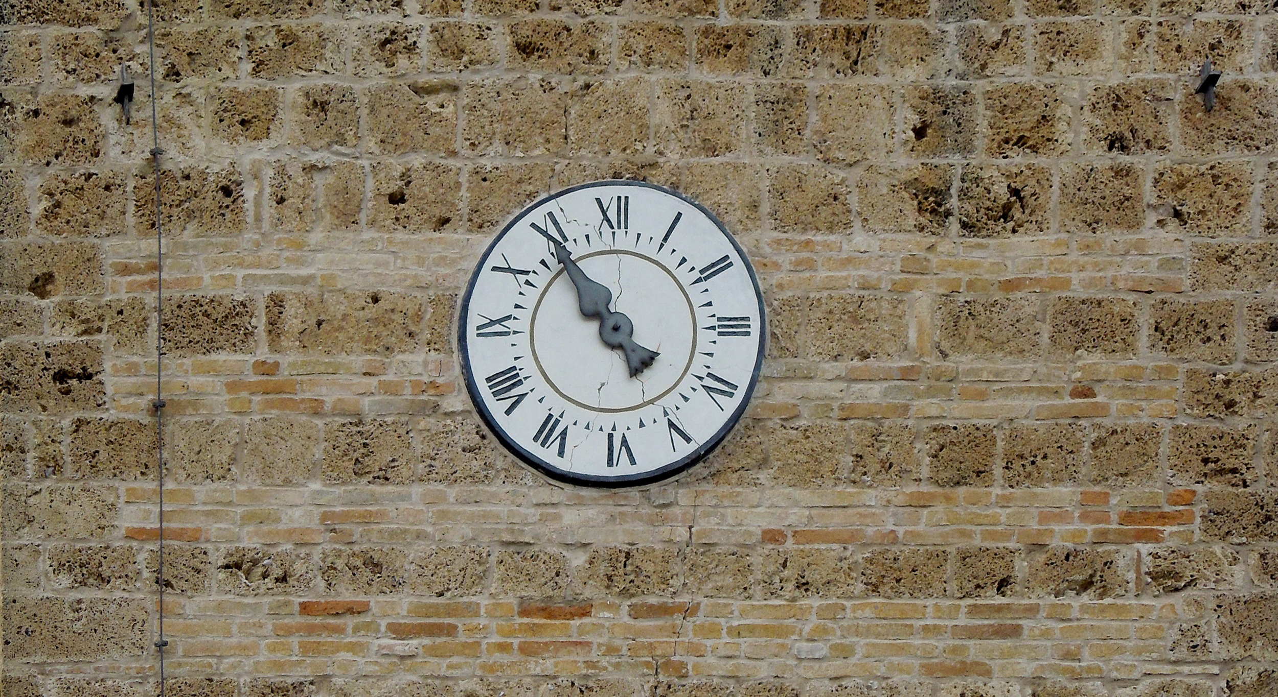 Orologio della Torre del Melatino di Nocella di Campli in provincia di Teramo.